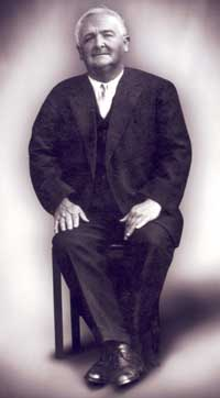 Familiaren artxibategitik lortutako argazkia